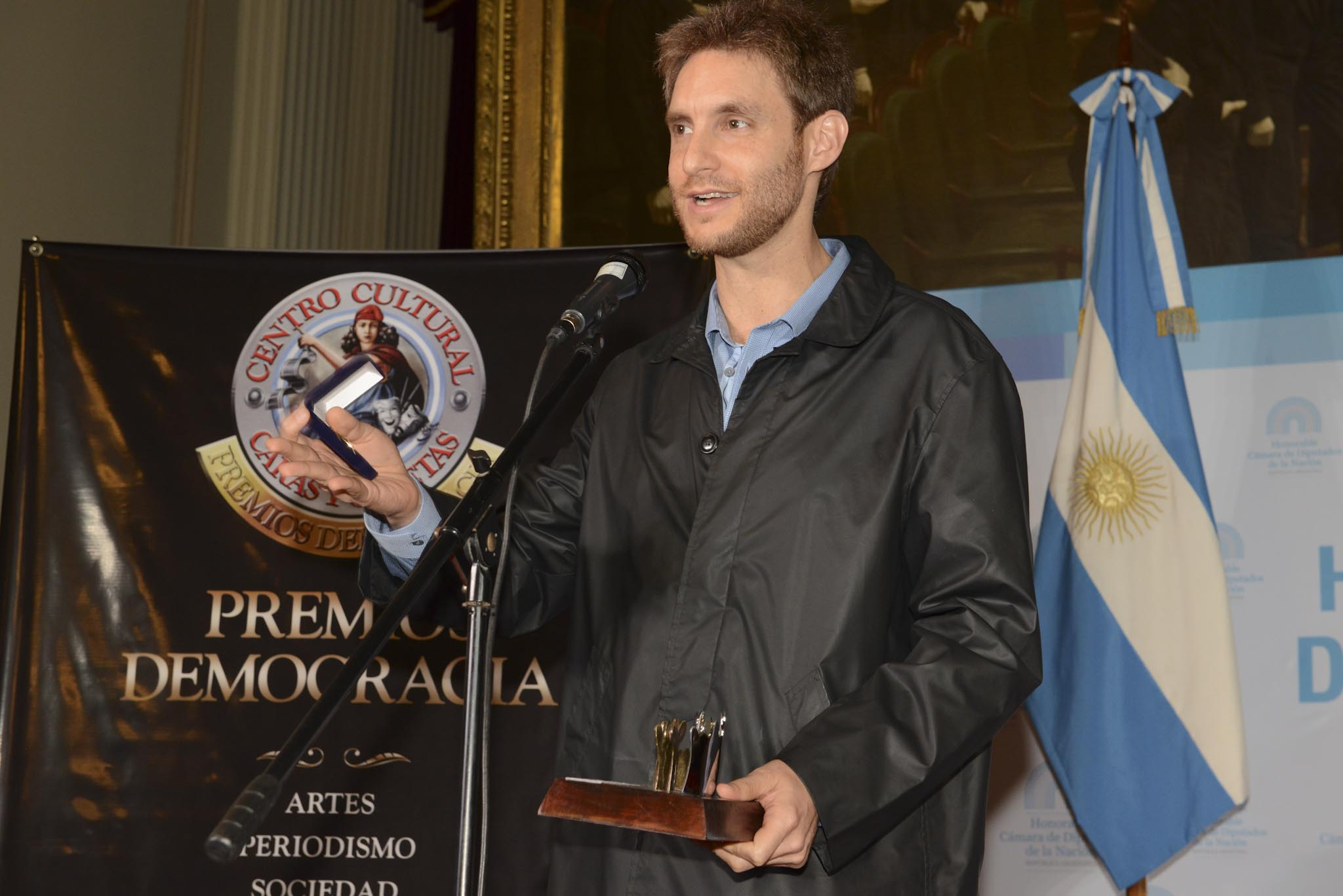 6.ª Entrega de los Premios Democracia